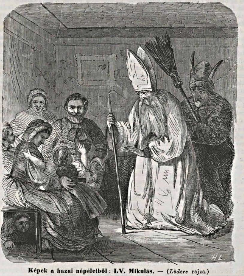 Képek a hazai népéletből, a Vasárnapi Újság illusztrációja a Mikulás-napi népszokásról